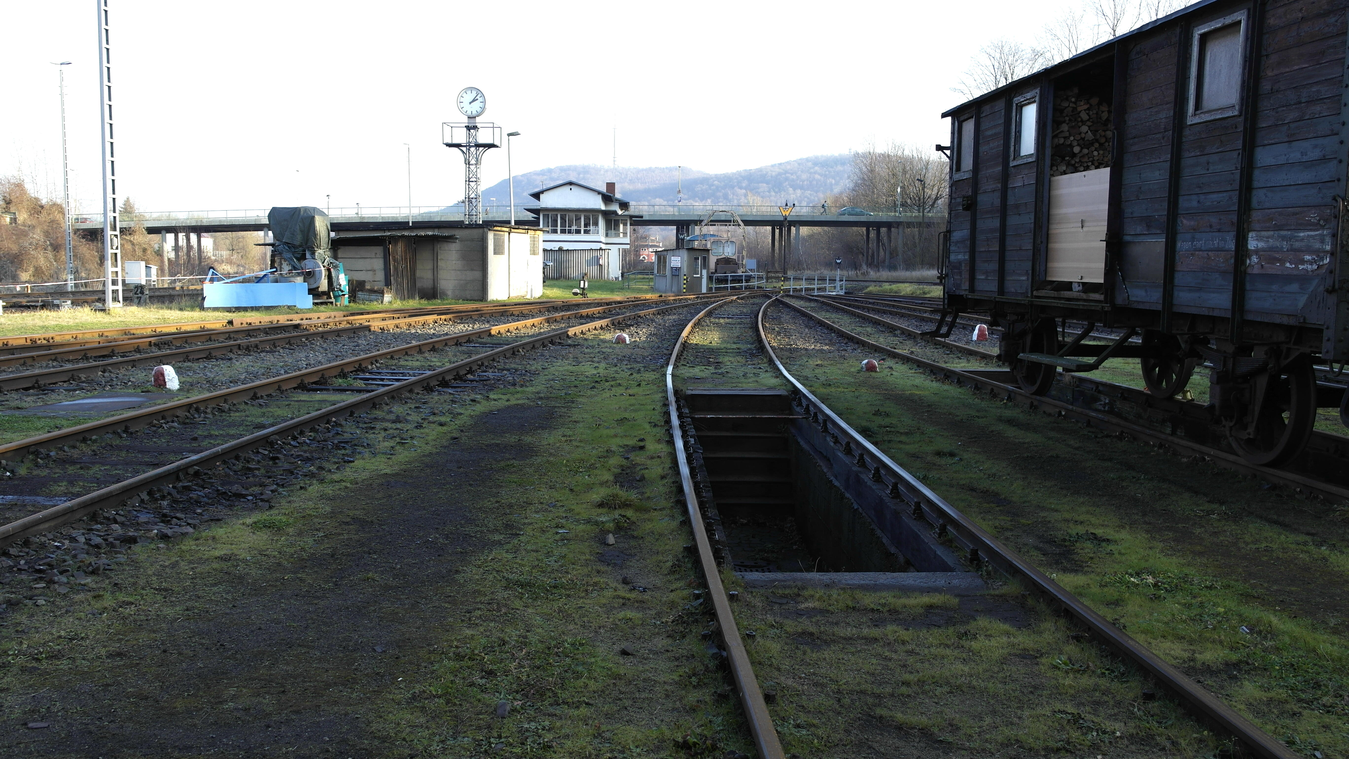 Löbau Bahnhof Zustand 2014